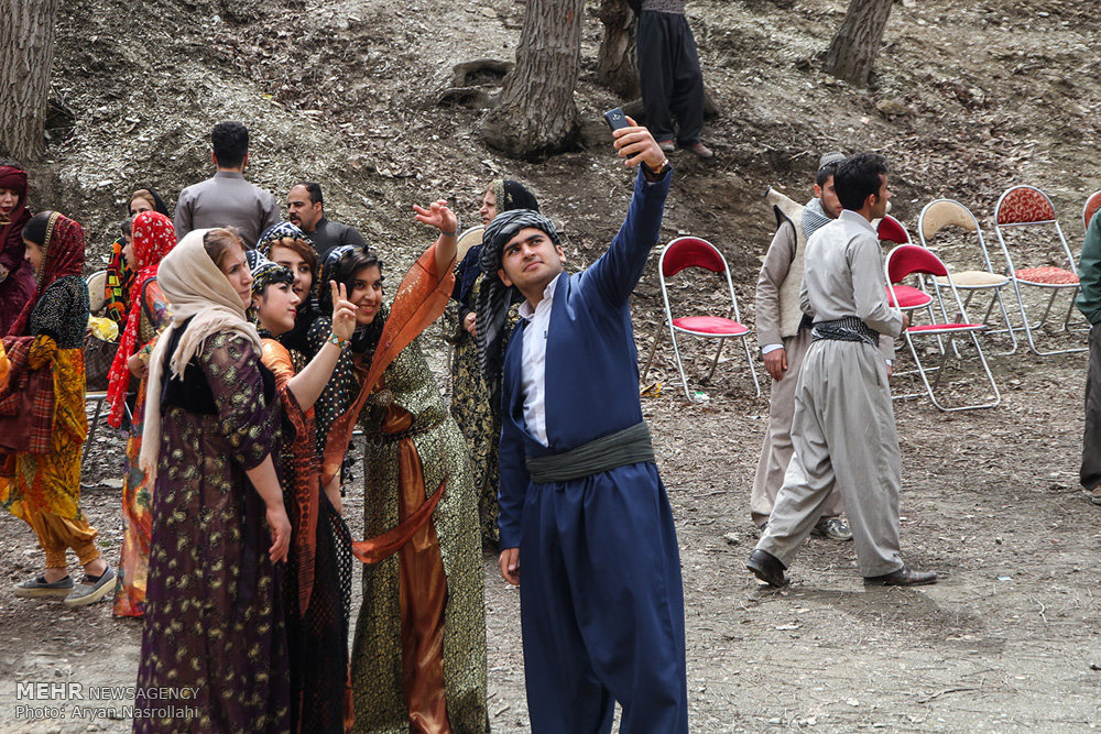 جشن نوروز به عنوان یکی از آیین های قدیمی در روزهای نخستین سال در مناطق شهری و روستایی استان کردستان با حضور و استقبال پرشور مردم برگزار می شود. در این آیین سنتی مردم هر روستا با جمع شدن در یک مکان مشخص ضمن روشن کردن آتش با رقص محلی و خواندن آواز فرا رسیدن سال نو را جشن میگیرند. مراسم نوروز روستای بیساران به عنوان یکی از پرجمعیت ترین و بزرگ ترین روستاهای کشور با حضور مردم روستا و شماری از هنرمندان کردستانی برگزار شد.